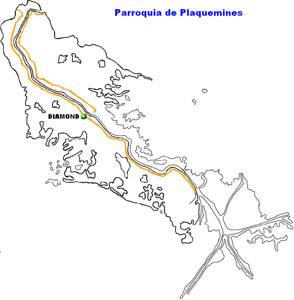 Diamond, Louisiana